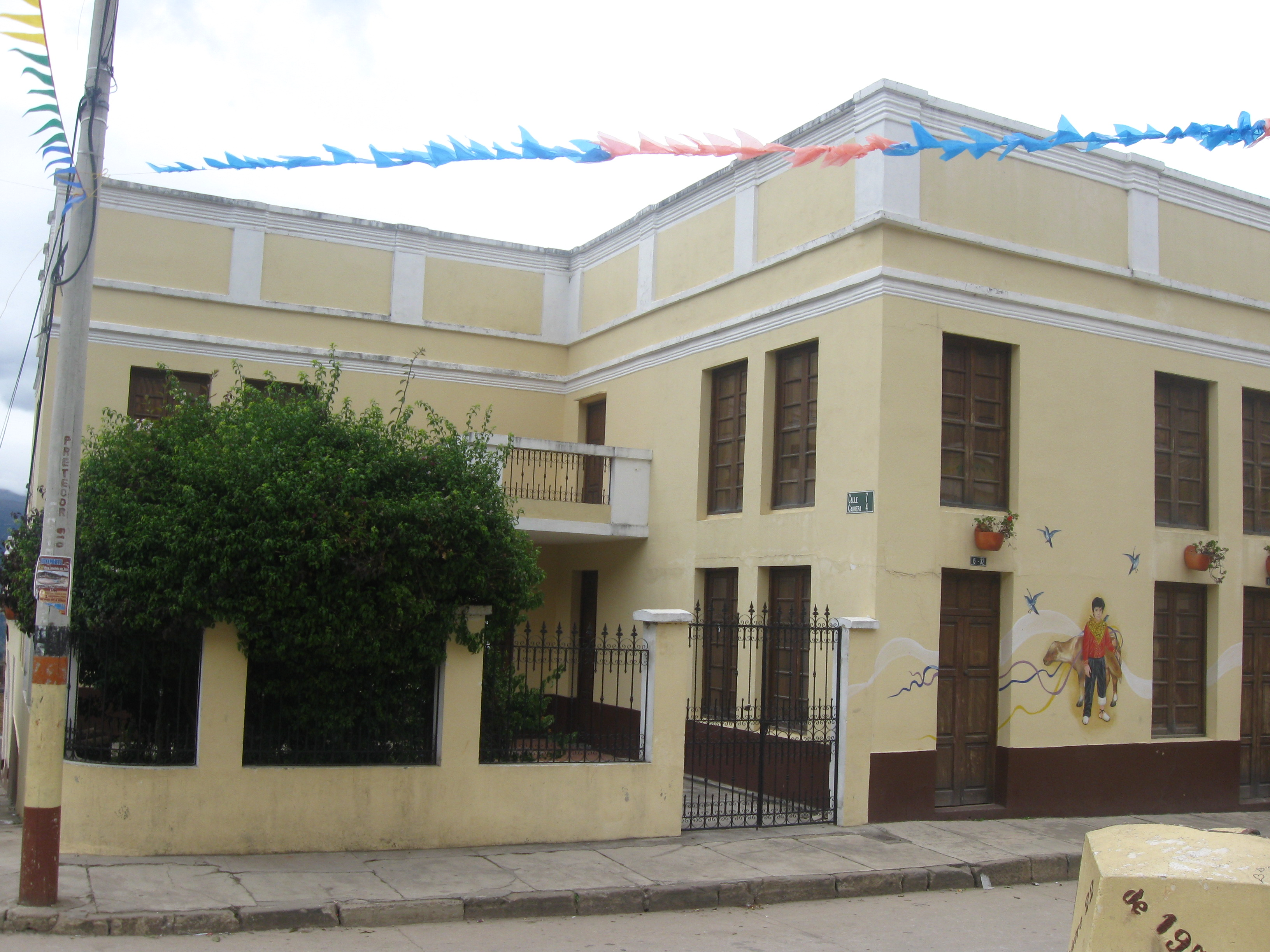 Calle de Sativanorte, Boyaca, Colombia. Muestra de la arquitectura de este pueblo.